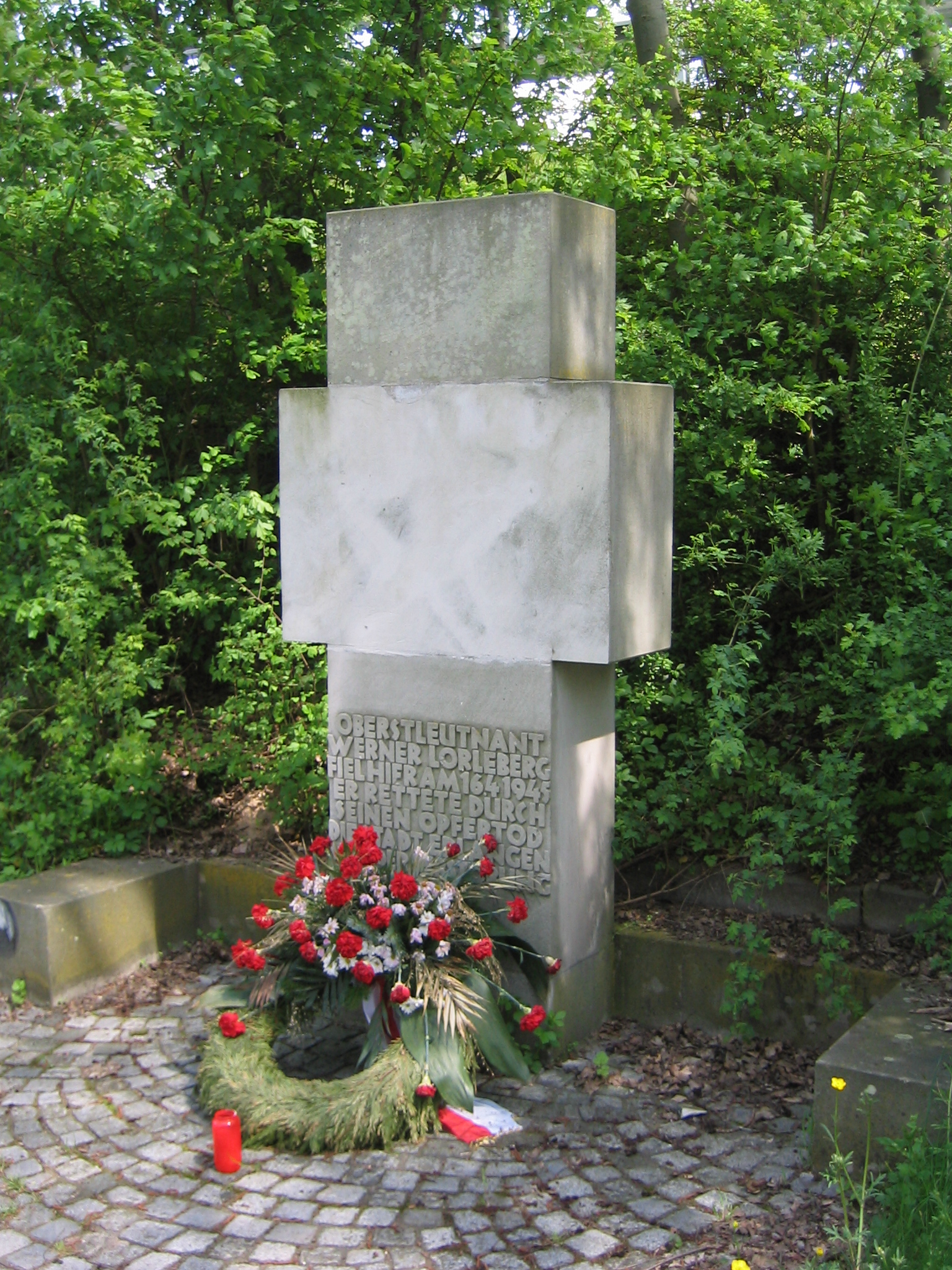 Denkmal an Oberstleutnant Werner Lorleberg in Erlangen, Nähe Thalermühle / Memorial Oberstleutnant Werner Lorleberg in Erlangen, near Thalermühle